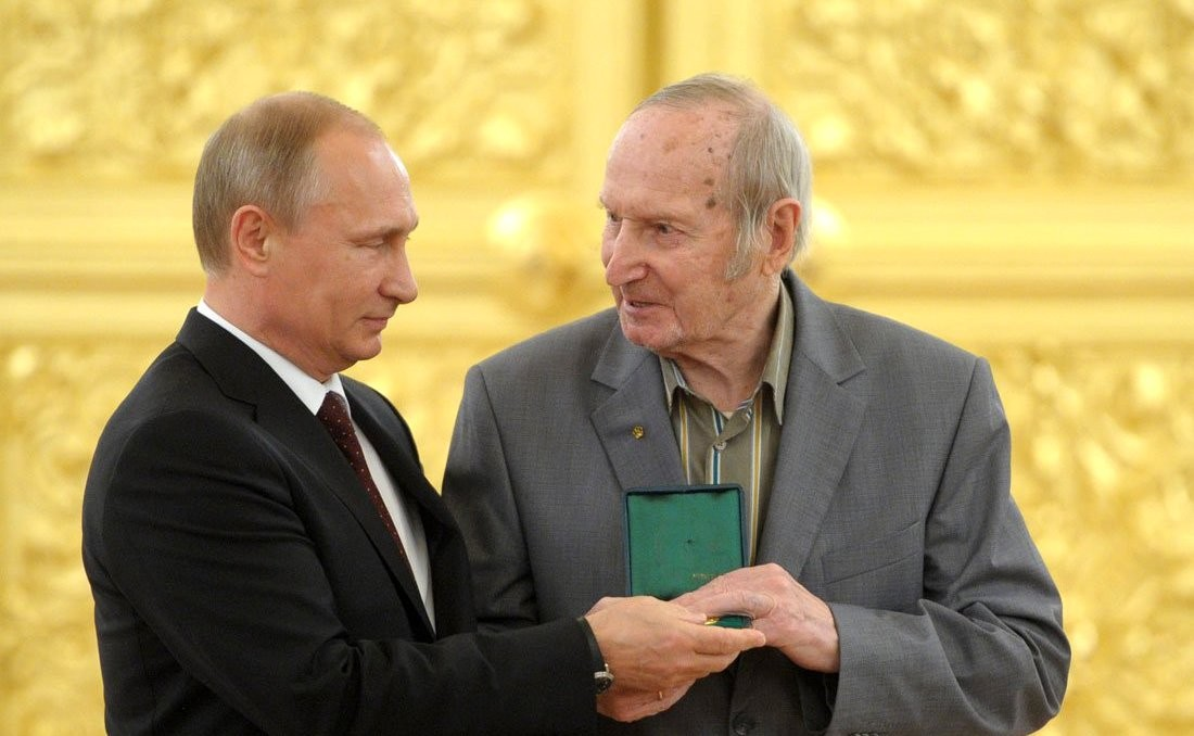 Владимир Путин вернул медаль Олимпийских игр 1956 года Виктору Шувалову, игроку сборной команды СССР по хоккею. 27 мая 2014 года Москва, Кремль